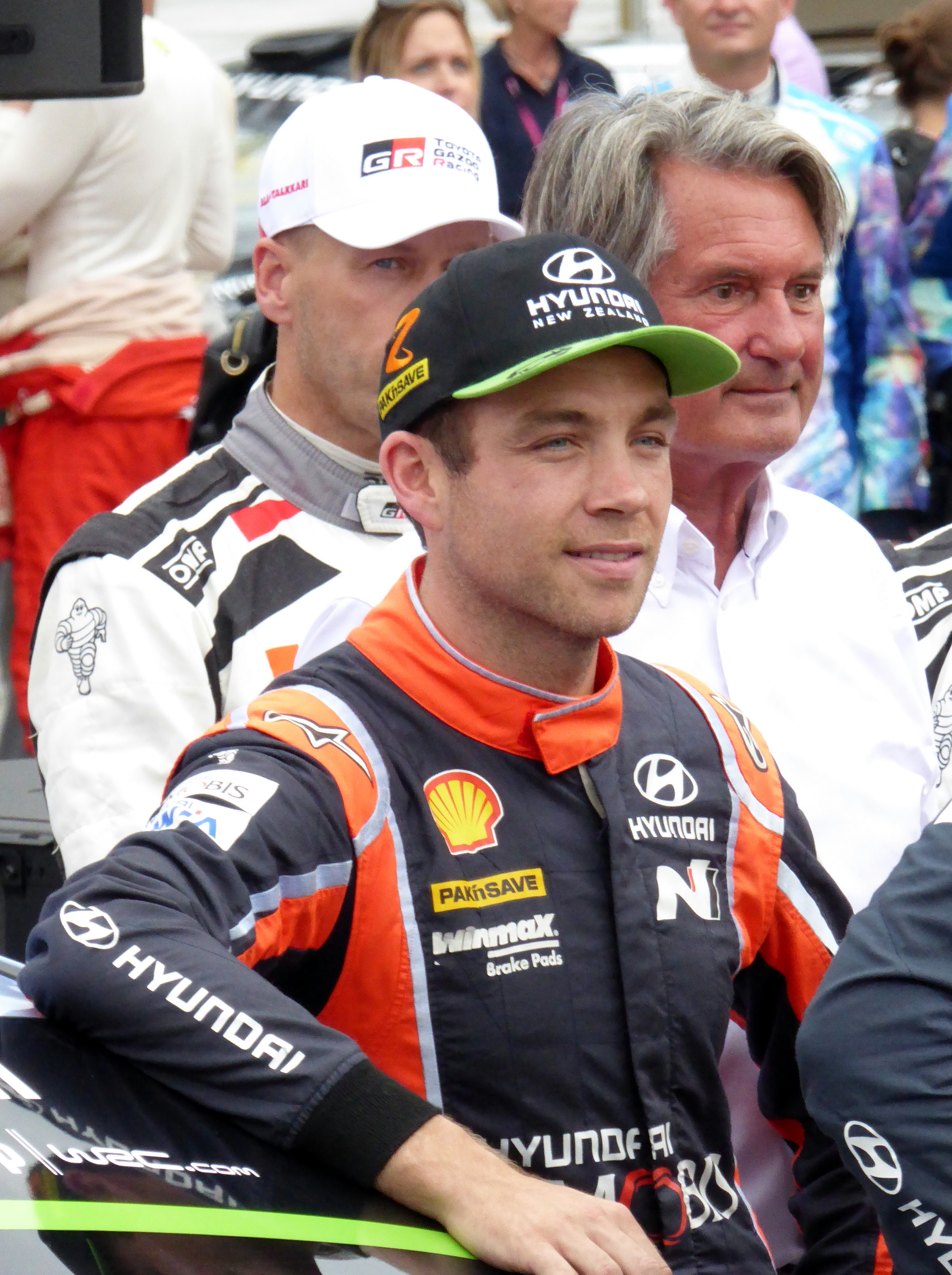 Rallye Deutschland 2017, Eröffnungszeremonie auf dem Tbilisser Platz in Saarbrücken